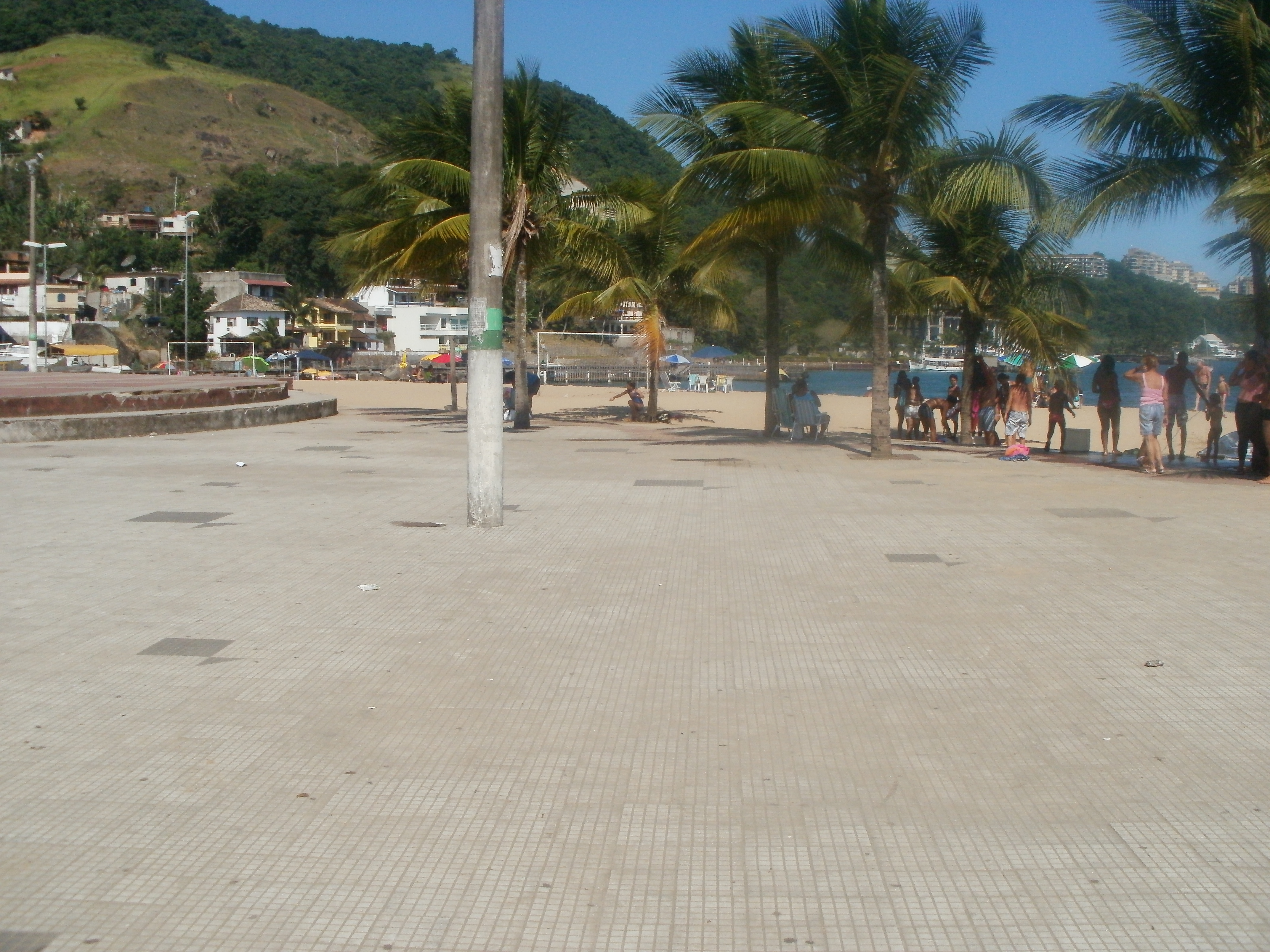 Conceição de Jacareí, distrito de Mangaratiba, estado do Rio de Janeiro, Brasil.